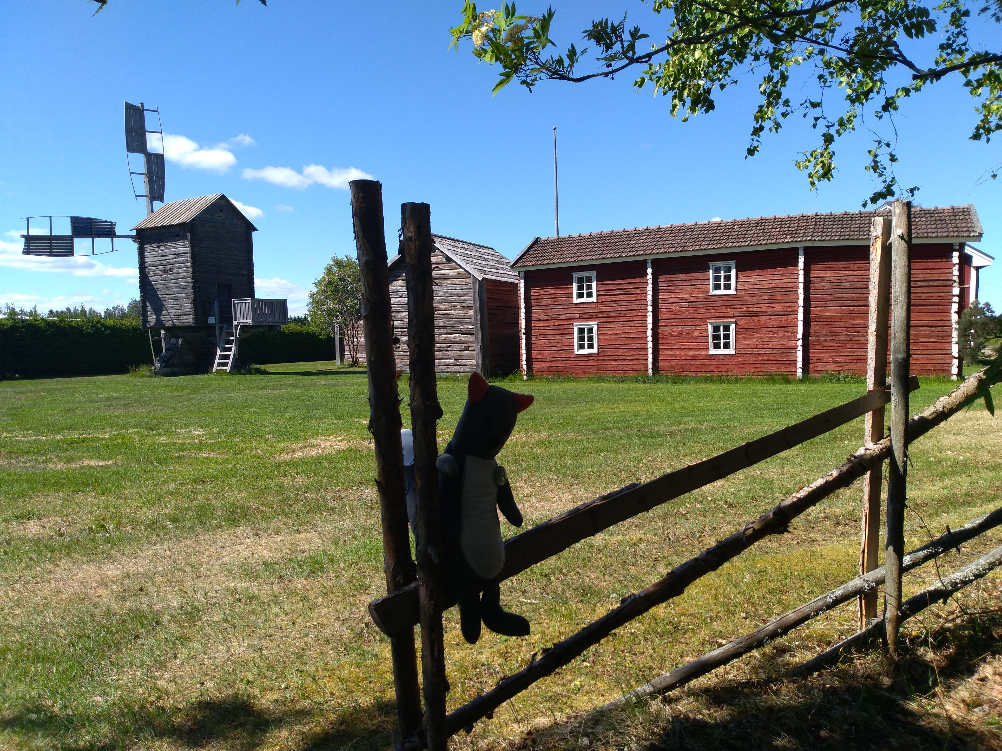 Museomaskotti Vaatermoukka tutustumassa museoon kesällä 2018.